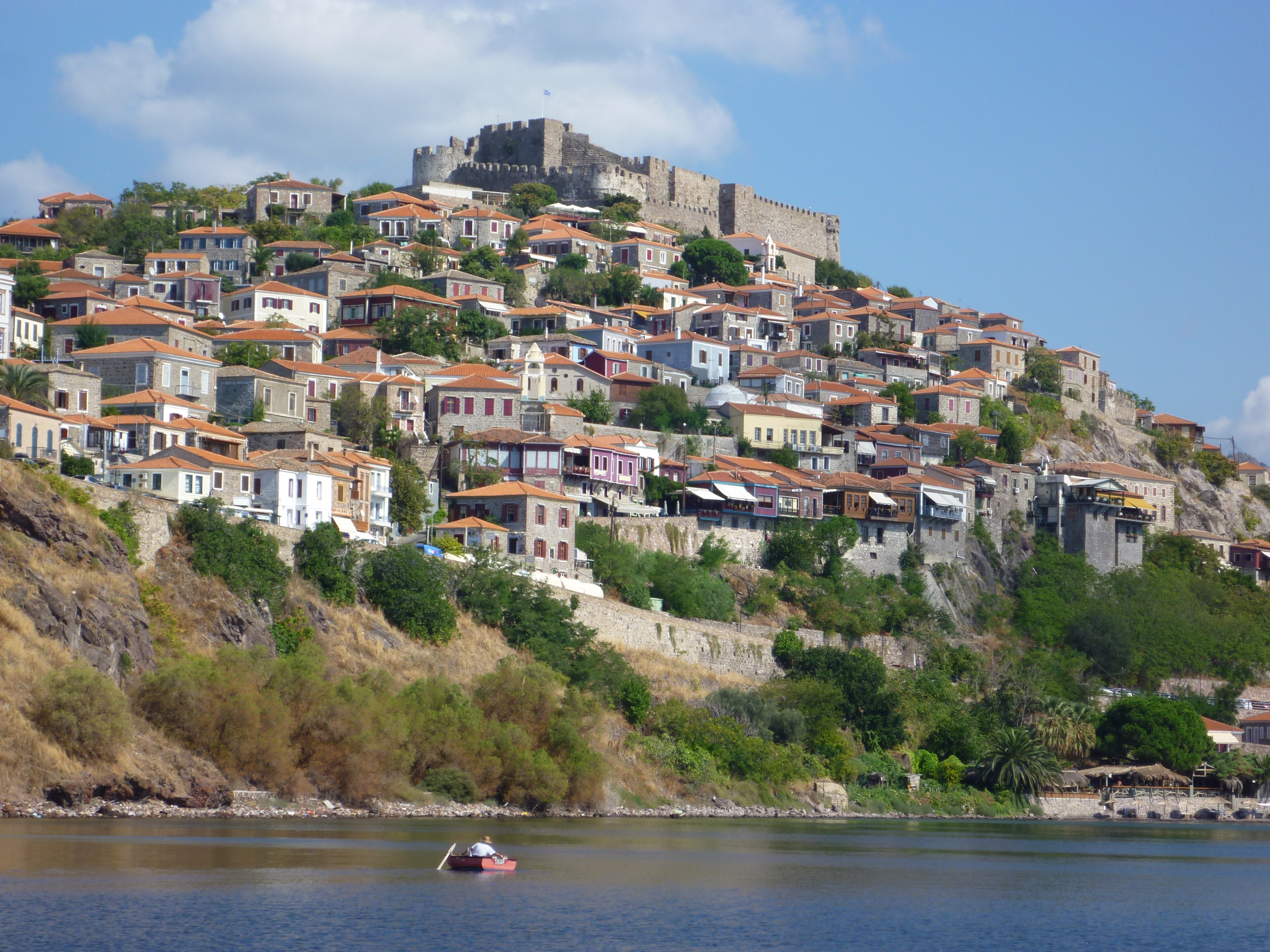 Blick auf die griechische Stadt Mithymna (Molivos), die sich im Norden der Insel Lesbos befindet. Die Stadt wird durch das Kastro gekrönt.